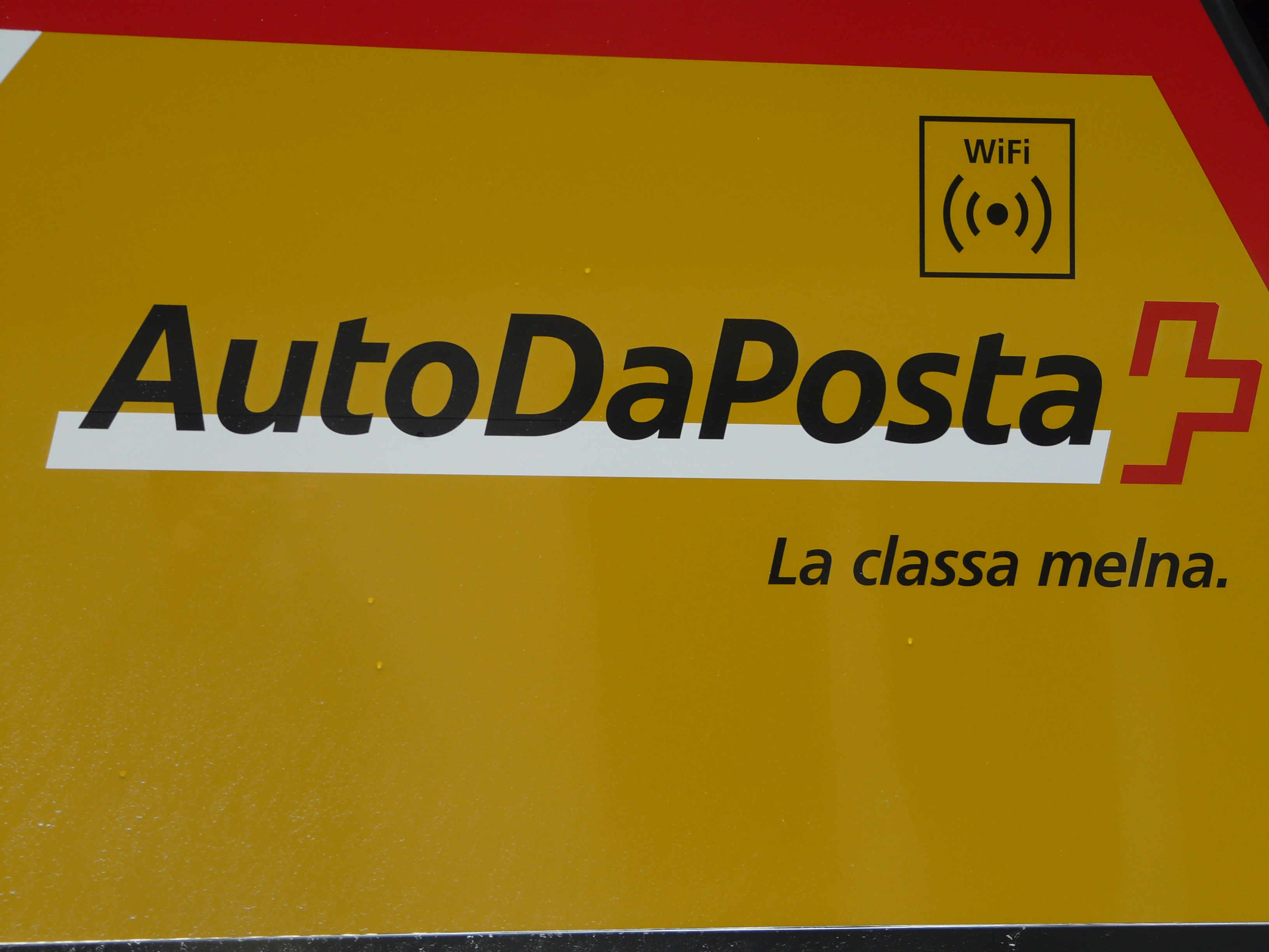 Schweizer Postauto (Auto da posta) mit Wifi-Hotspot